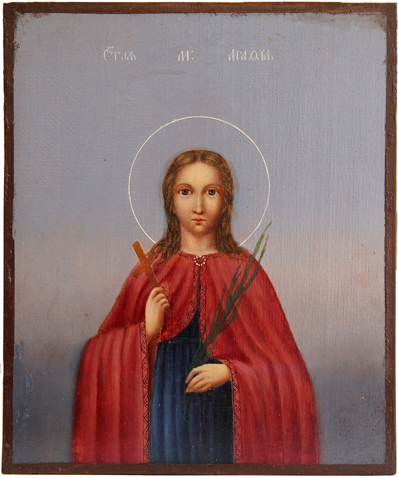 Старинная русская икона Агафия. XIX век. Выполнена на доске размером: 18х15 см и помещена в киот-витрину. Размер киота: 21х18х3,8 см. Святая мученица Агафия считается покровительницей животноводческих хозяйств и животноводов, ей молятся доярки, скотоводы.